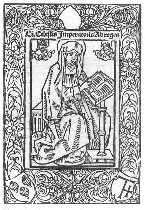 Die Hl. Birgitta. Holzschnitt aus Sunte Birgitten Openbaringe (Hans van Ghetelen 1496); mit "Mohnkopf"- und "T"-Wappen im Rahmenwerk